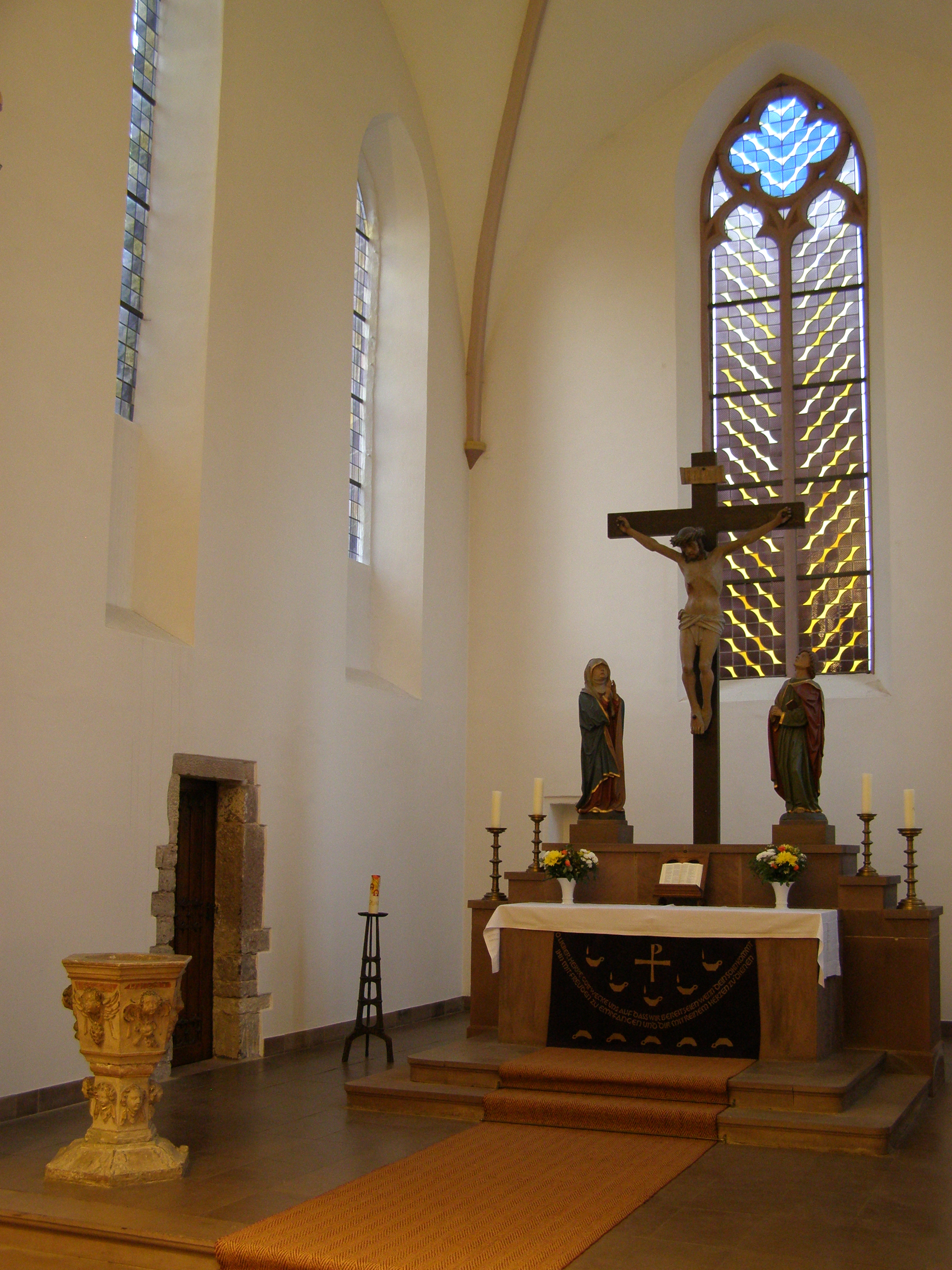 Altarraum der Kilianikirche Höxter